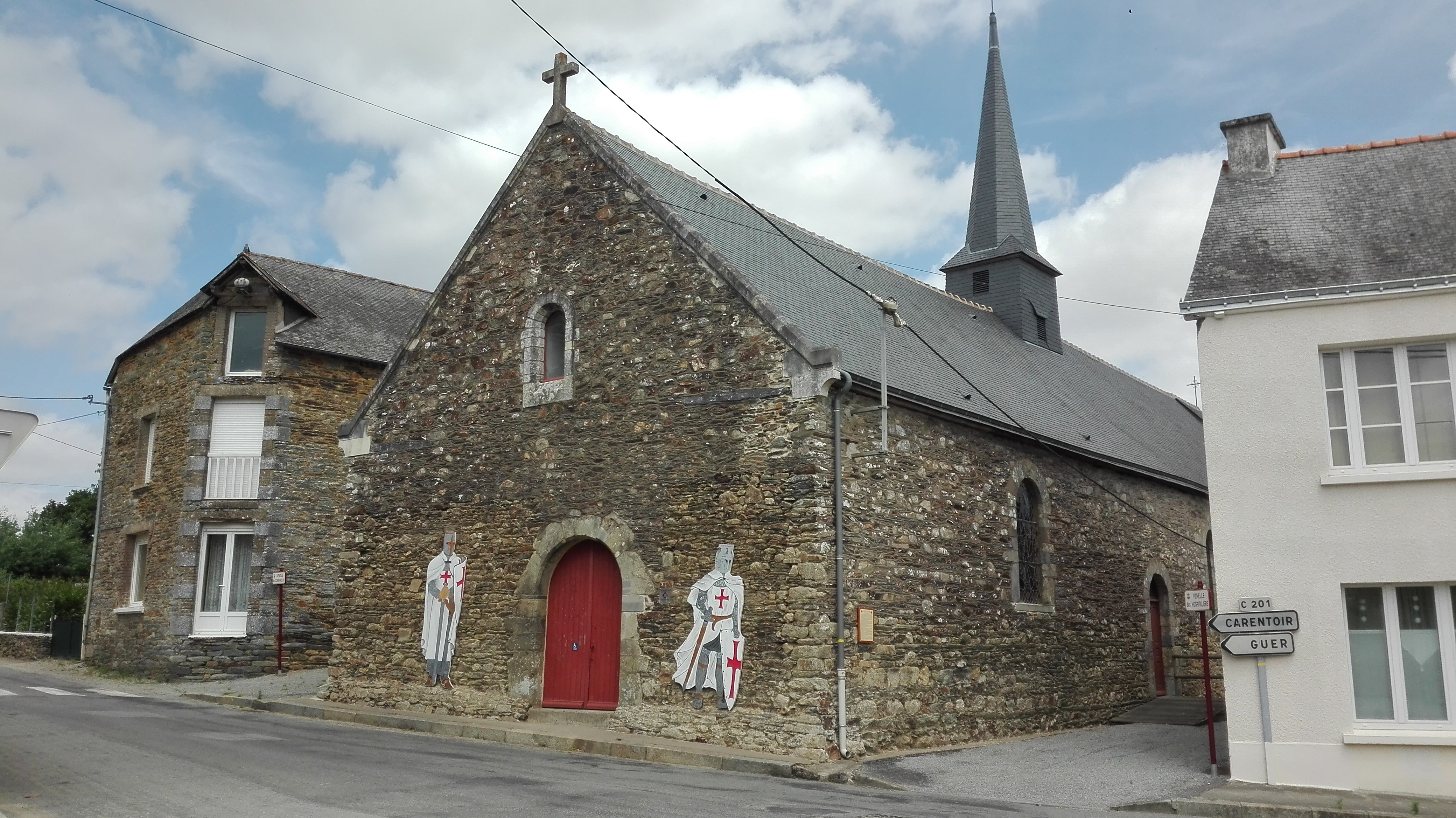 Chappelle templière de Carentoir, Morbihan, Bretagne, France, 2017